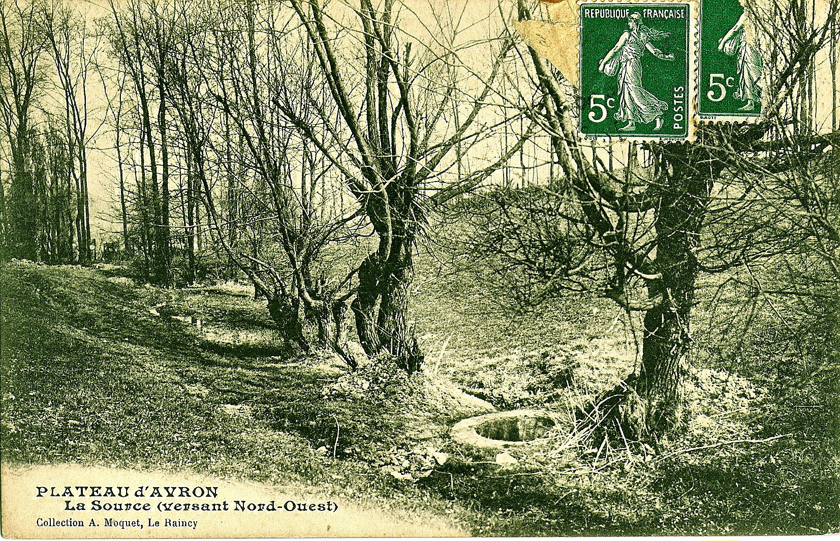 Carte postale ancienne éditée par Moquet au Raincy PLATEAU D'AVRON : La Source (versant Nord-Ouest)